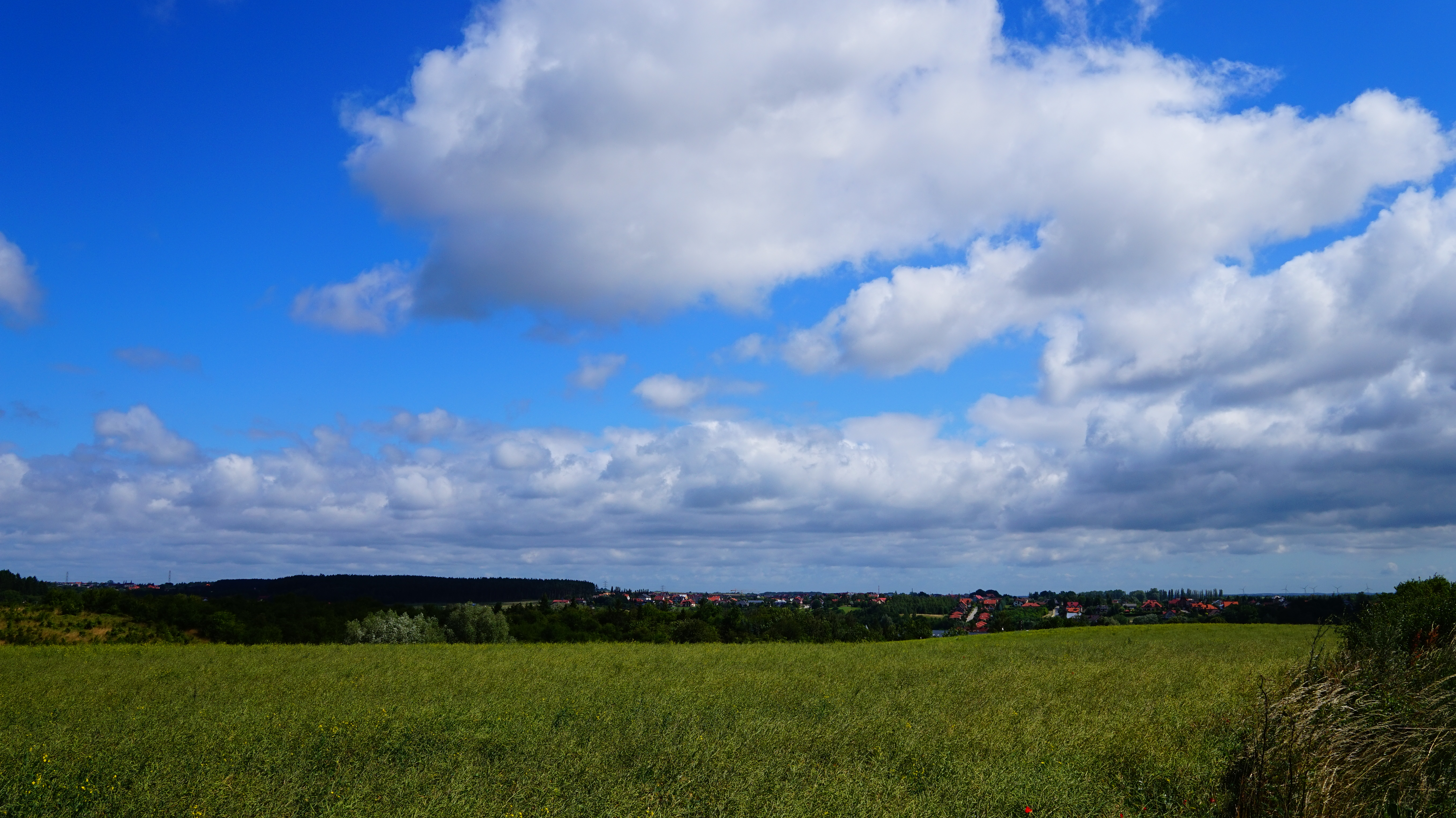 Wieś Juszkowo, pow. gdański